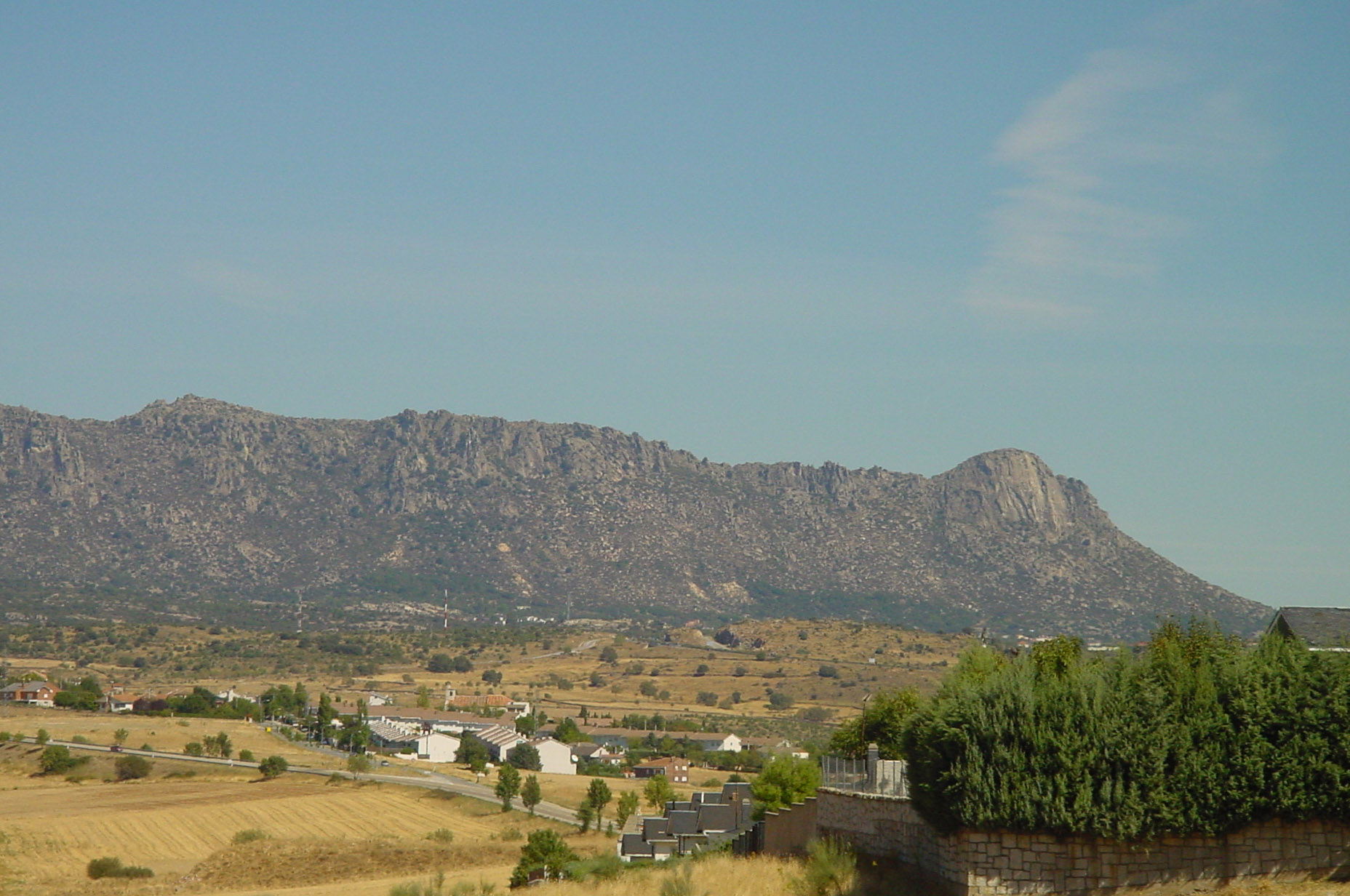 Vista de La Cabrera.